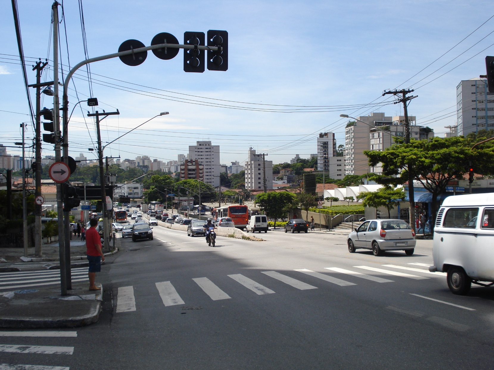 Rua Heitor Penteado, bem perto da Estação Vila Madalena, zona oeste de São Paulo, SP.